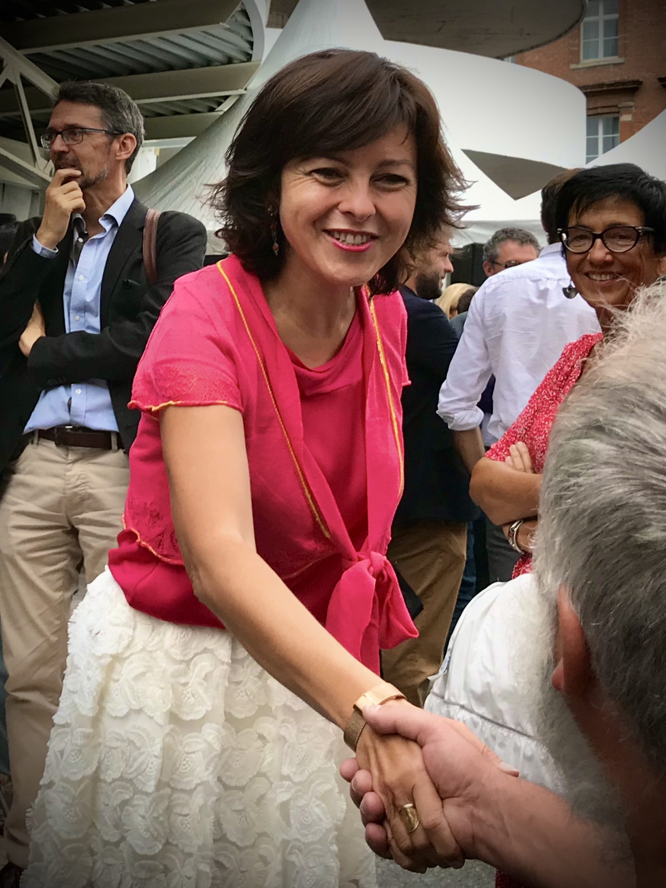 Carole Delga, présidente de la Région Occitanie / Pyrénées-Méditerranée, lors d'une inauguration en septembre 2019 à Toulouse.